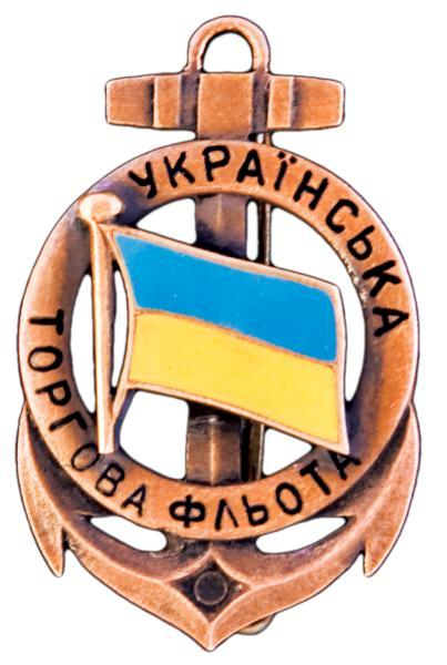 Нагрудный знак торгового флота Украинской Державы, 1918 год.